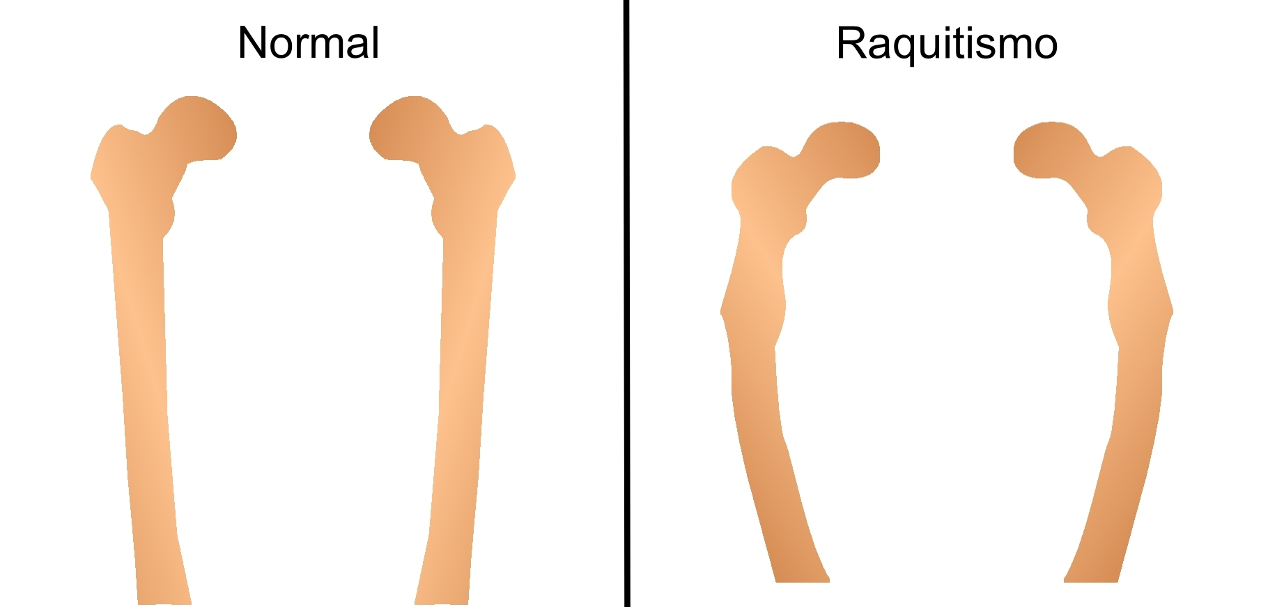 Esquema en el que se aprecia el arqueamiento del fémur provocado por el raquitismo.